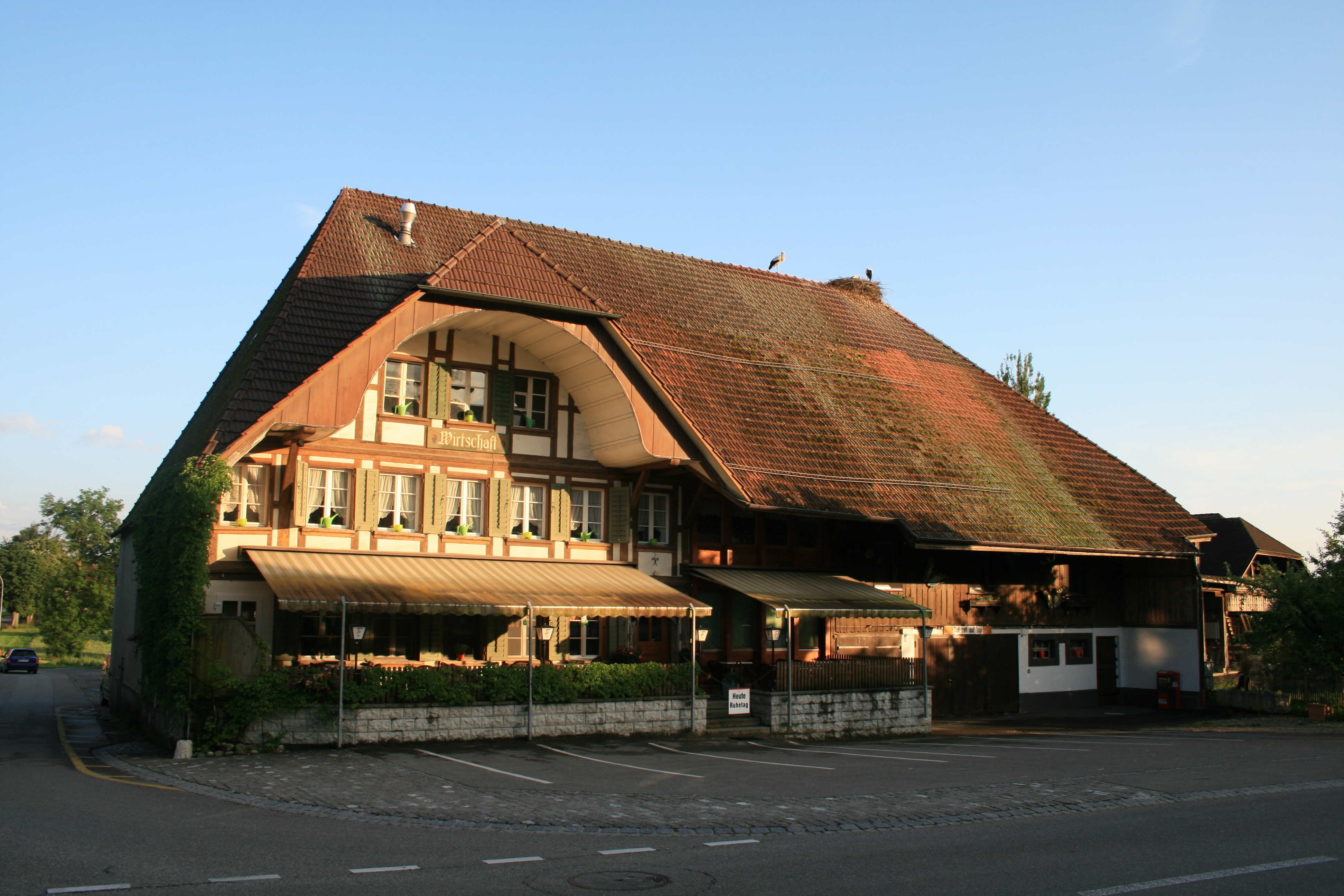 Gasthof Traube, Grossaffoltern